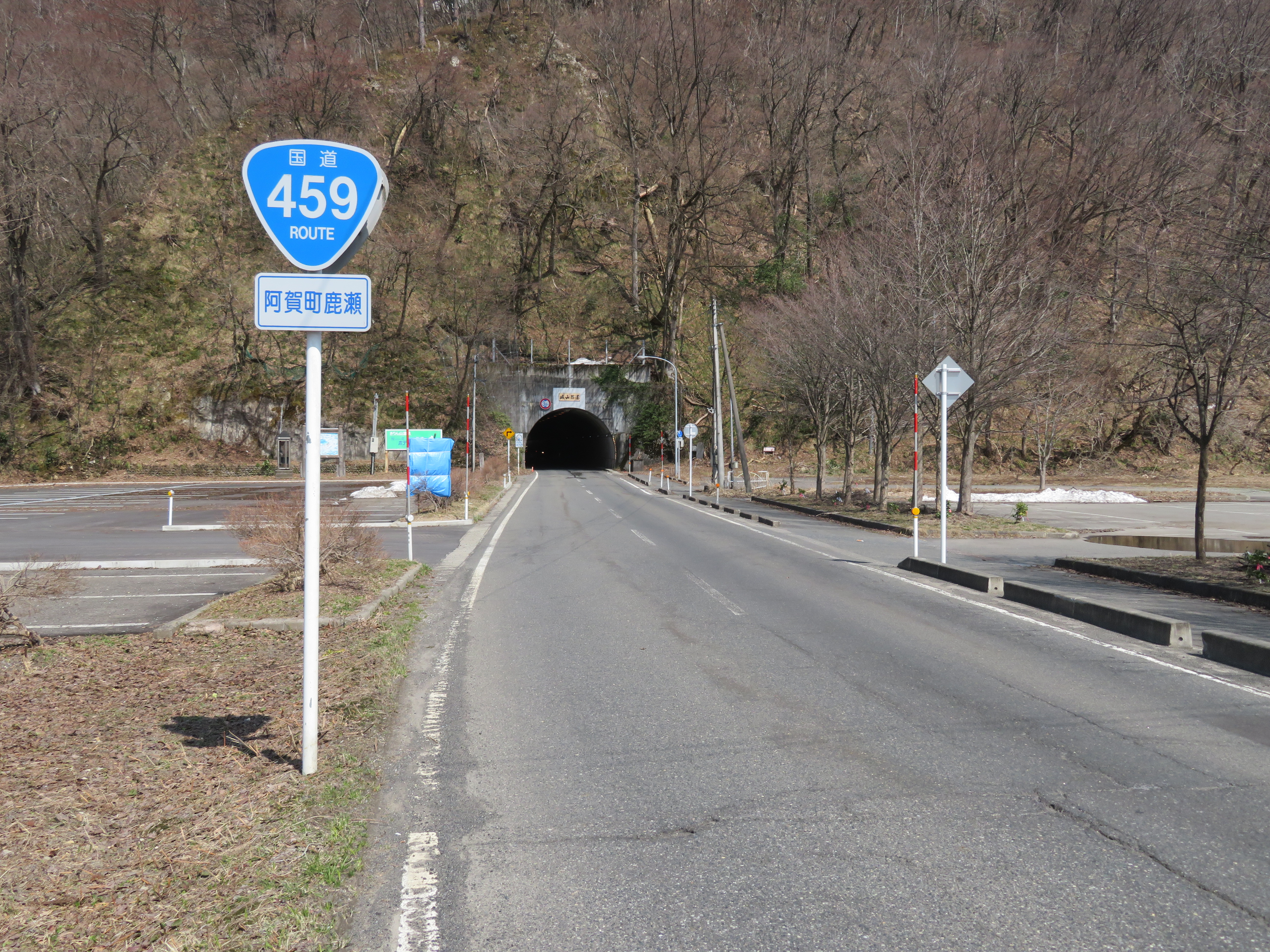 国道459号線新潟県阿賀町鹿瀬付近